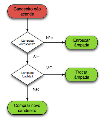 Fluxograma que descreve a estrutura de um algoritmo simples